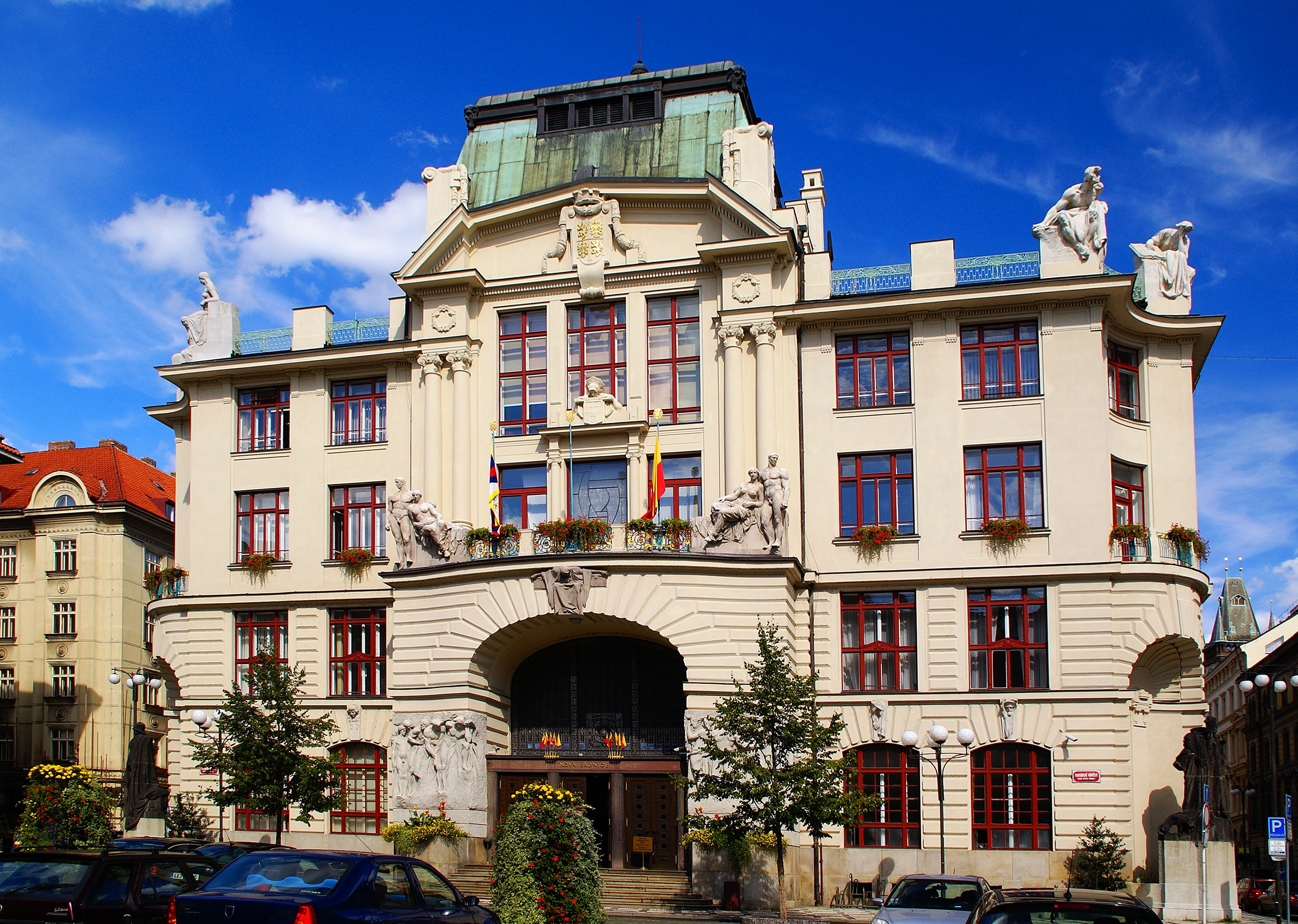 Nová radnice na Starém Městě pražském byla postavena v letech 1908 - 1911, autorem projektu je architekt Osvald Polívka. V budově dnes sídlí Magistrát hlavního města Prahy.